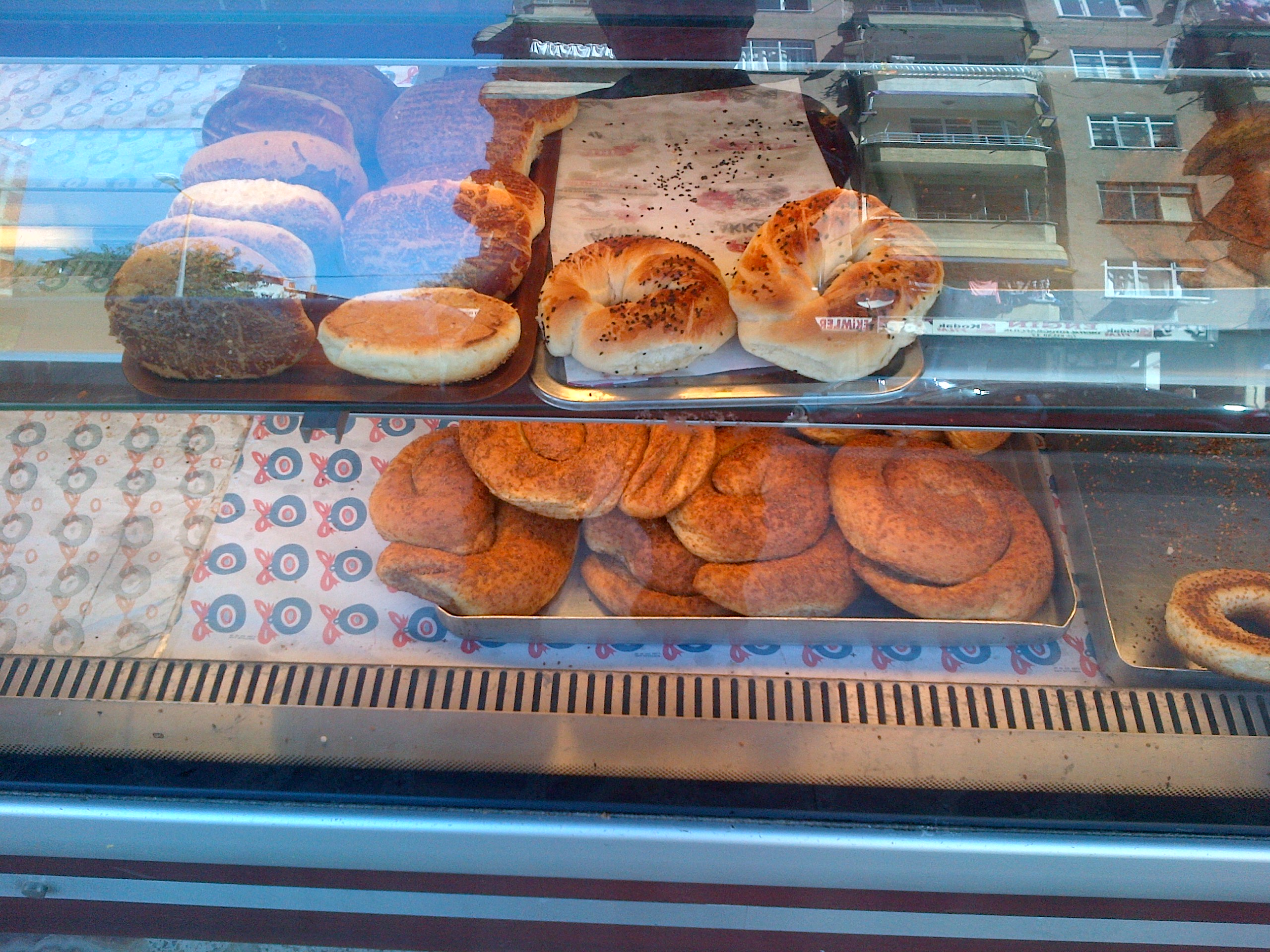 Açma (achma) es un bollo turco ni dulce ni salado.